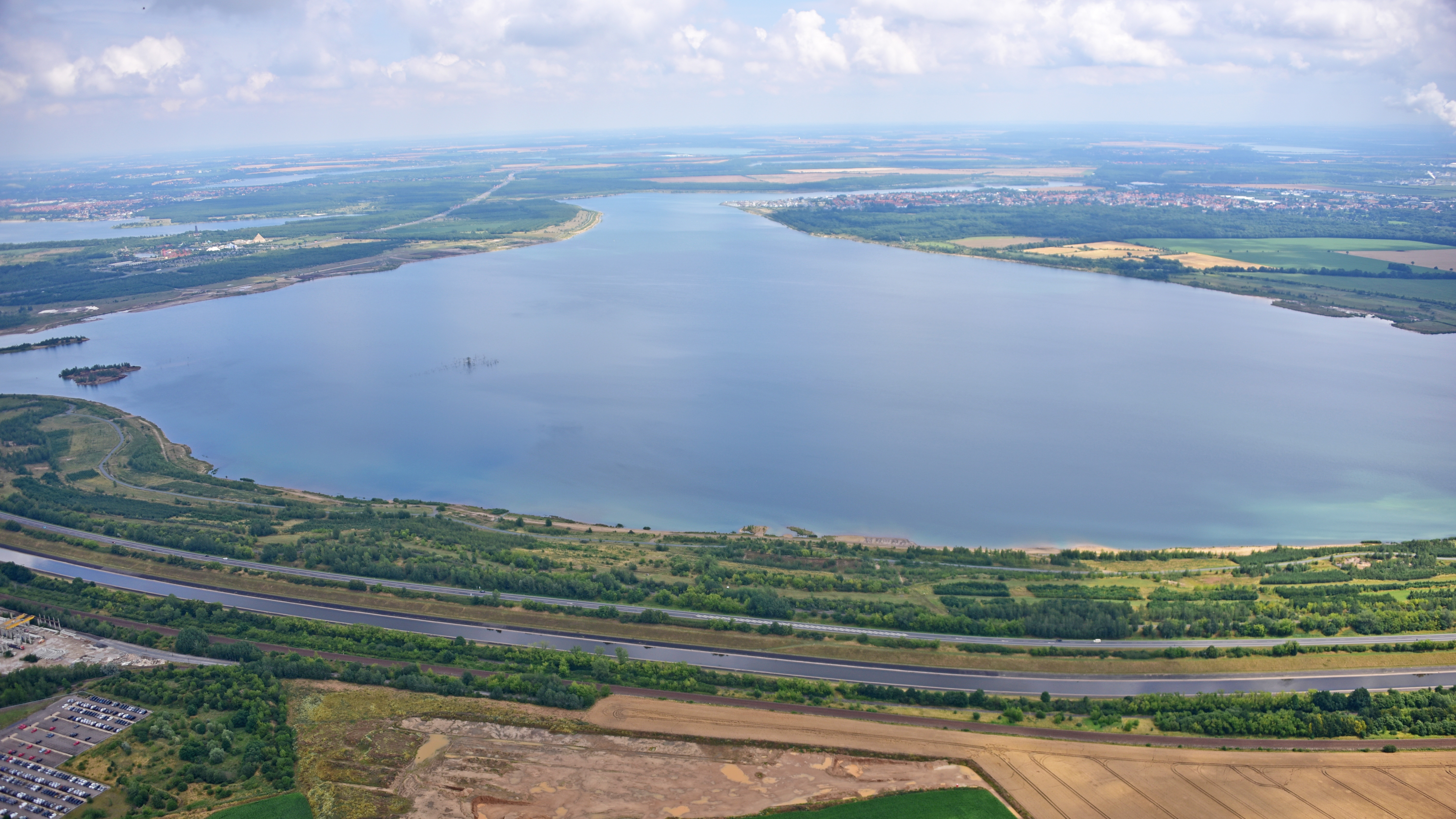 Zwenkauer See, Luftaufnahme (2017)